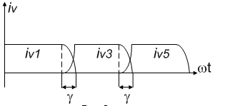 комутація